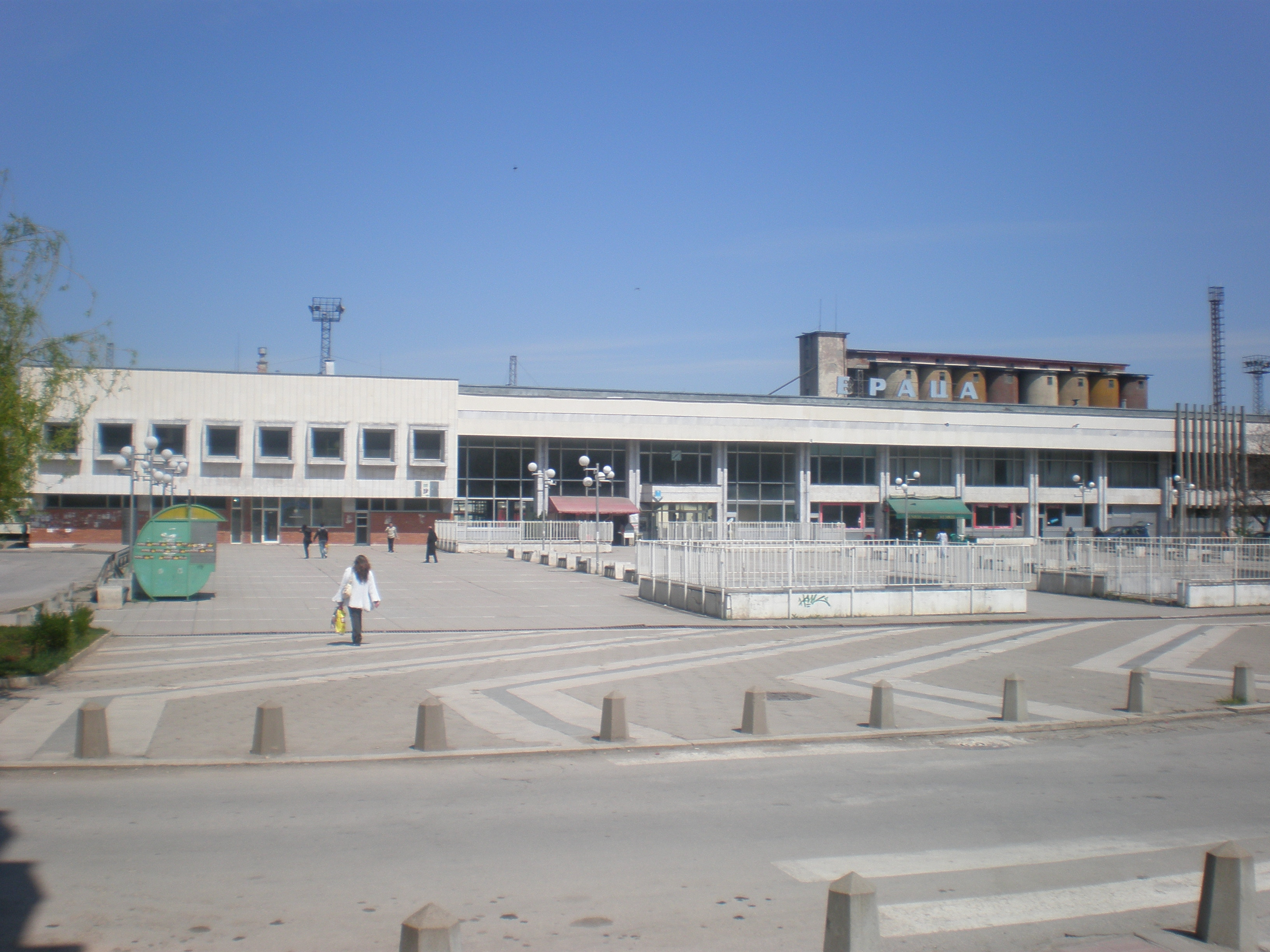 жп гара "Враца"